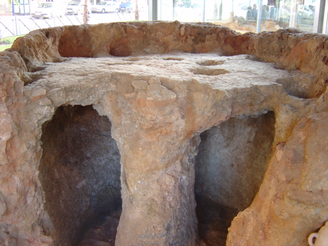 Hornos Púnicos de Torre Alta (Rotonda de los Hornos Púnicos, San Fernando, Cádiz)